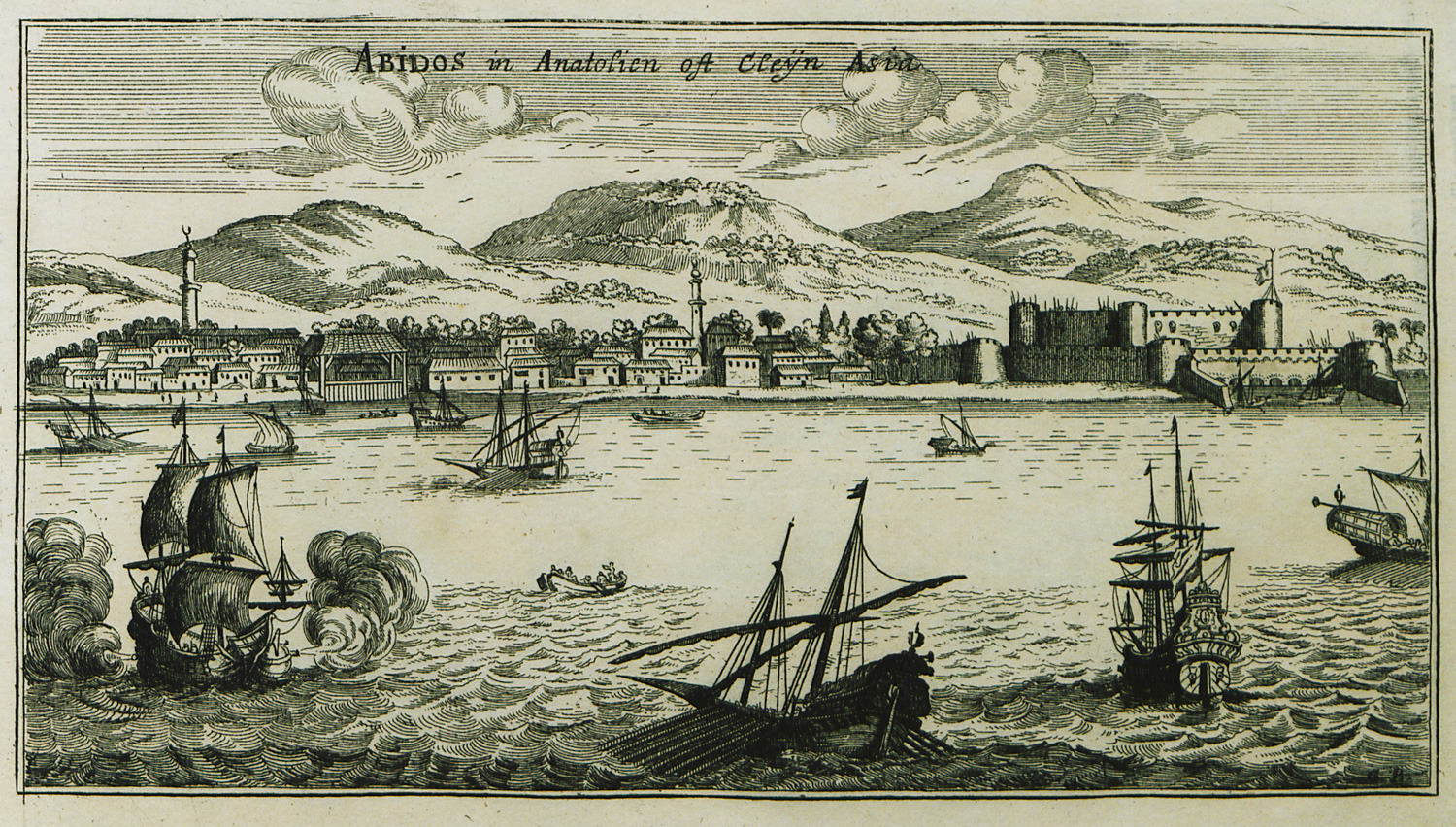 Jacob Peeters. Description des principales villes, havres et isles du golfe de Venise du coté oriental. Comme aussi des villes et forteresses de la Moree, et quelques places de la Grèce, Antwerp, Sur le marché des vieux Souliers, 1690.